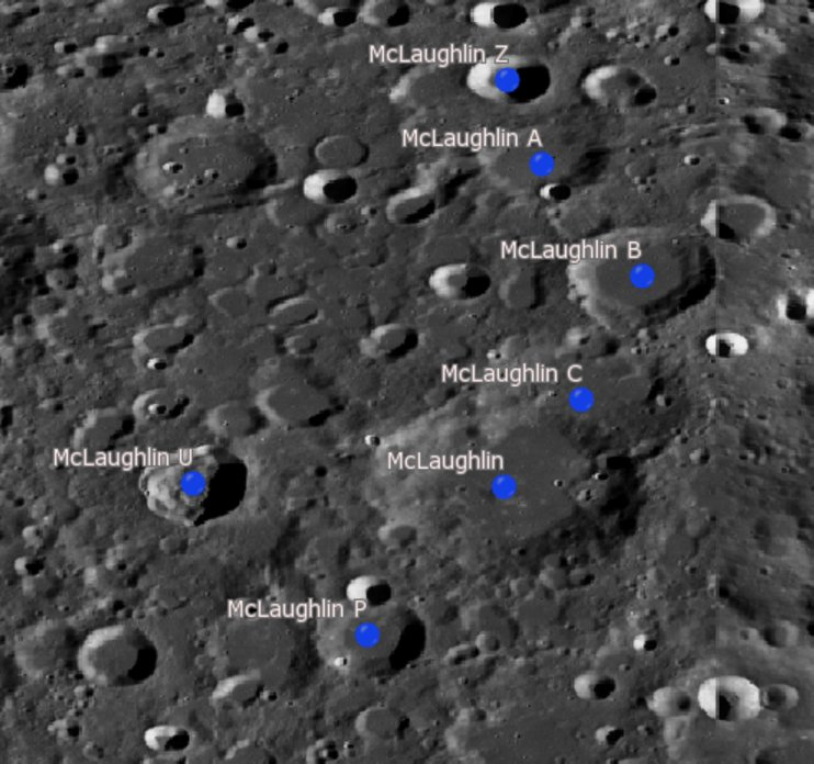 Cráter lunar McLaughlin. Cráteres satélite. (Imagen LRO)